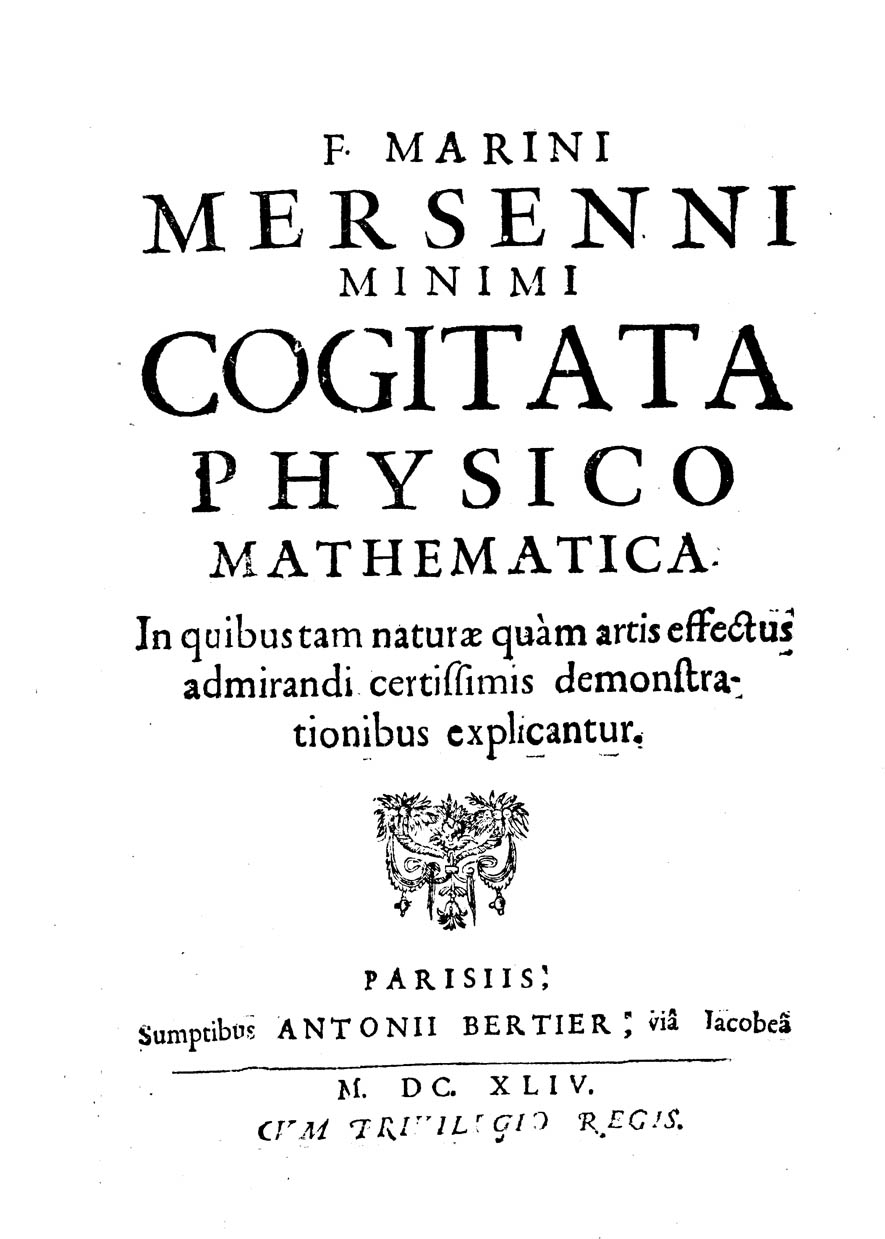 F. Marini Mersenni Minimi Cogitata physico mathematica. In quibus tam naturae quam artis effectus admirandi certissimis demostrationibus explicantur. - Parisiis : sumptibus Antonij Bertier, via Iacobea, 1644. - [30], 40, [24], 41-224, [8], 225-370, [16], 96, [12], 140, [30] p. : ill. ; 4º .